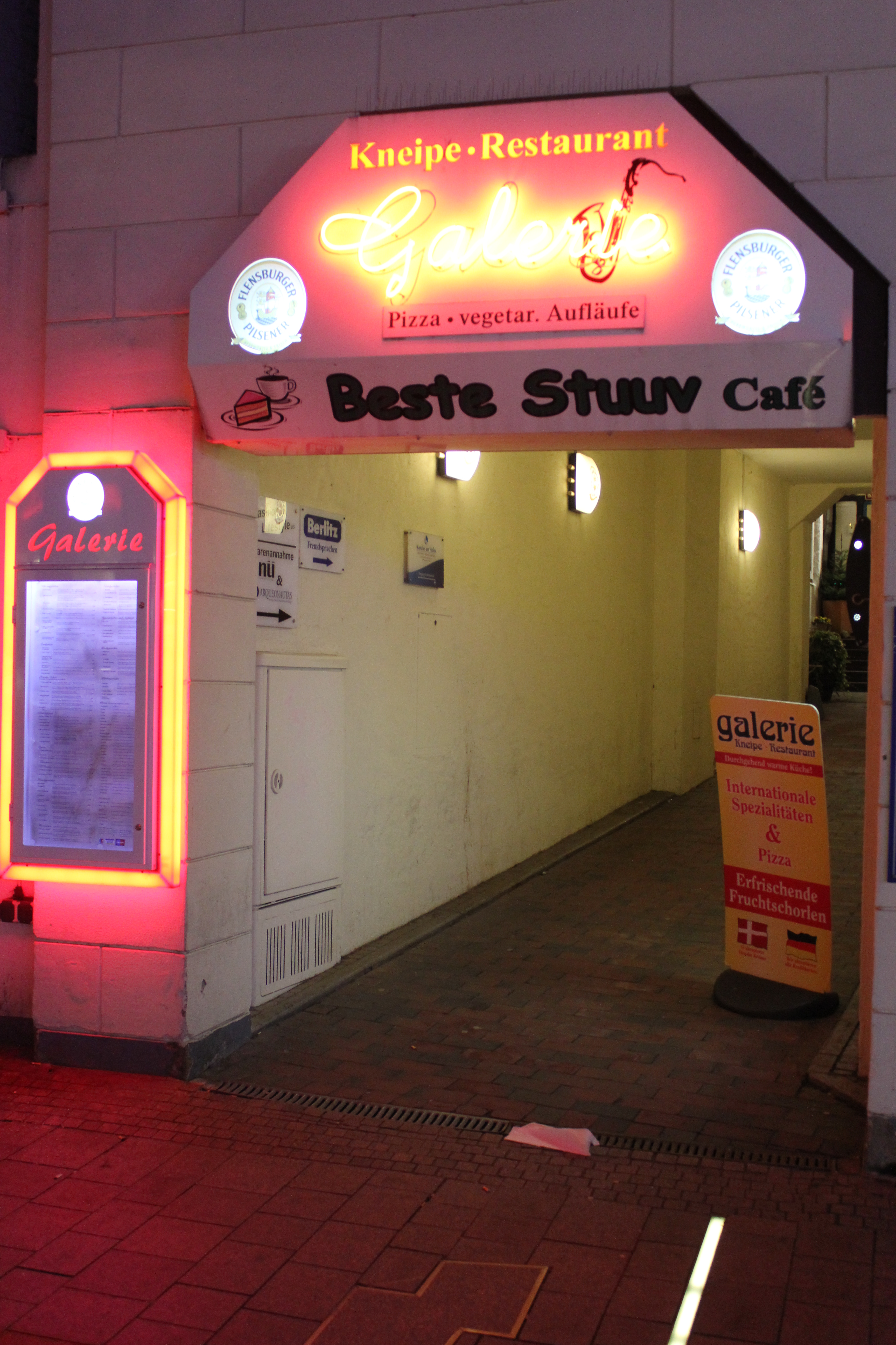 Zugang vom Holm zum Hof der Galerie (Flensburg), Bild 02